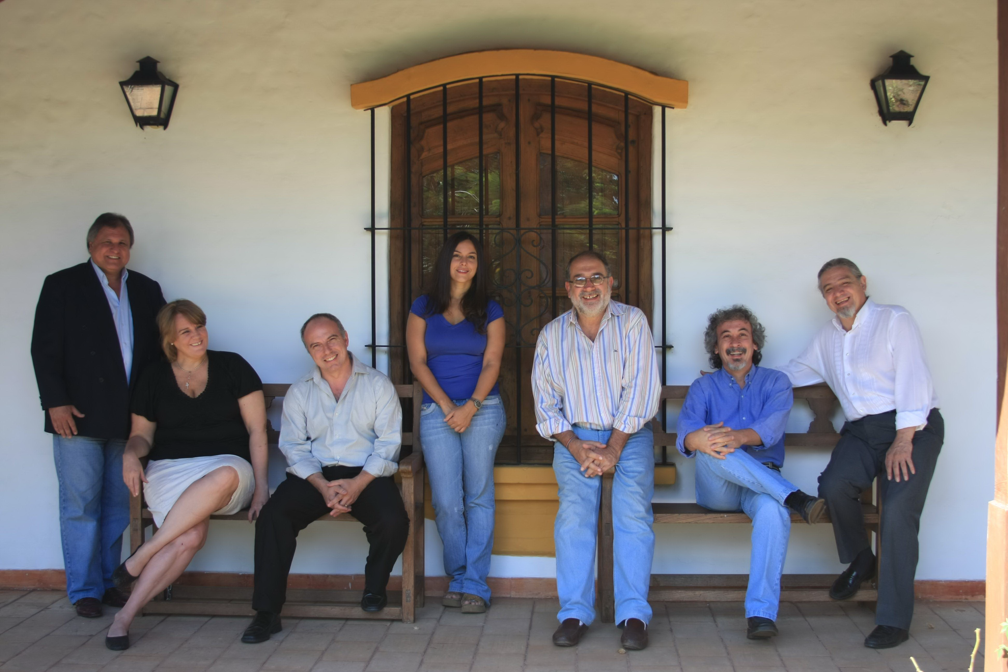 grupo sembrador, posando en la casa de jorge garbett